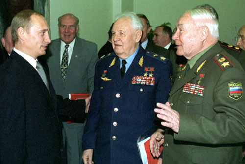 Маршал Авиации Александр Ефимов